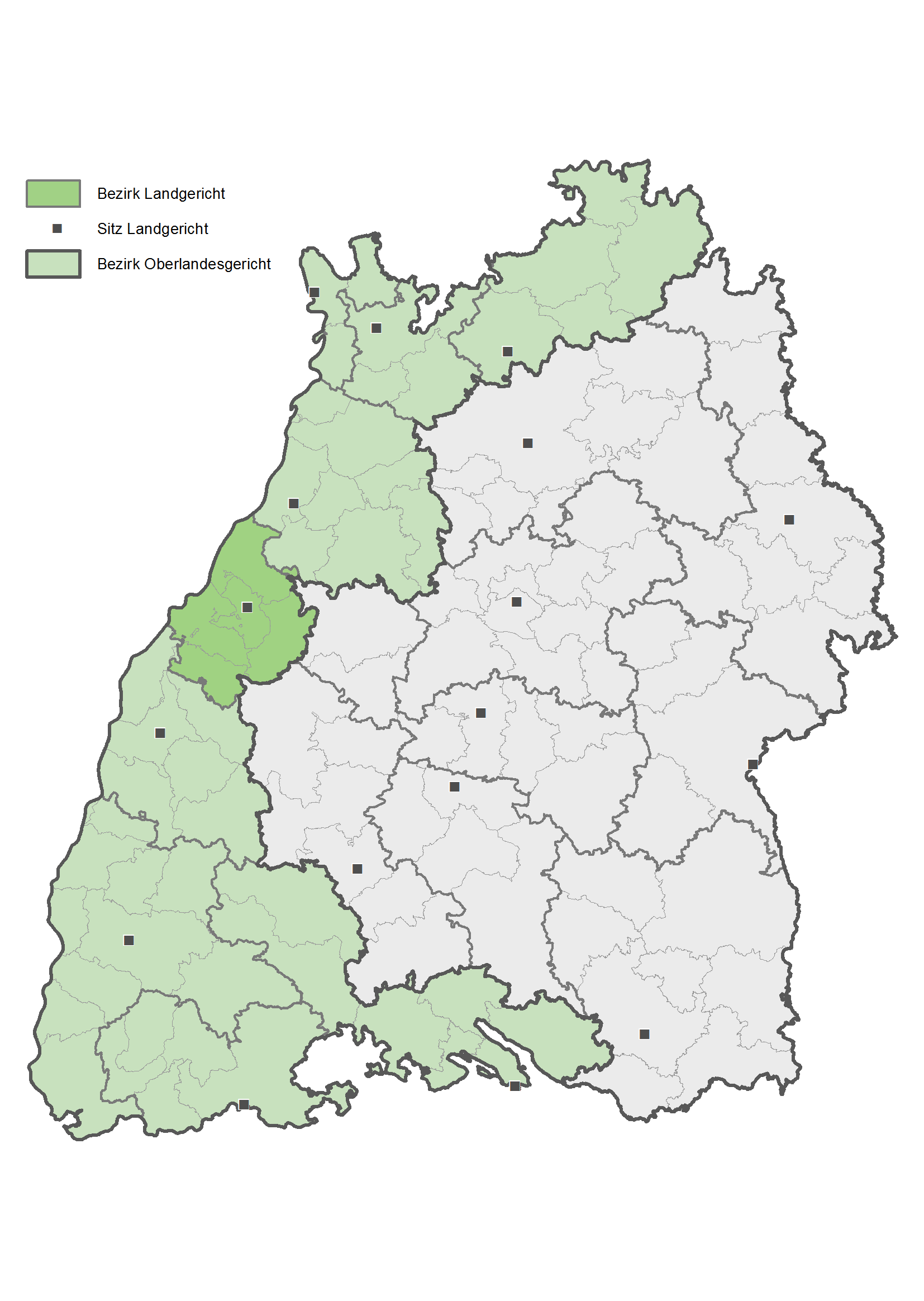 Karte des Bezirks des Landgerichts Baden-Baden in Baden-Württemberg